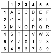 Cette image représente la variante du carré de Polybe avec des chiffres.